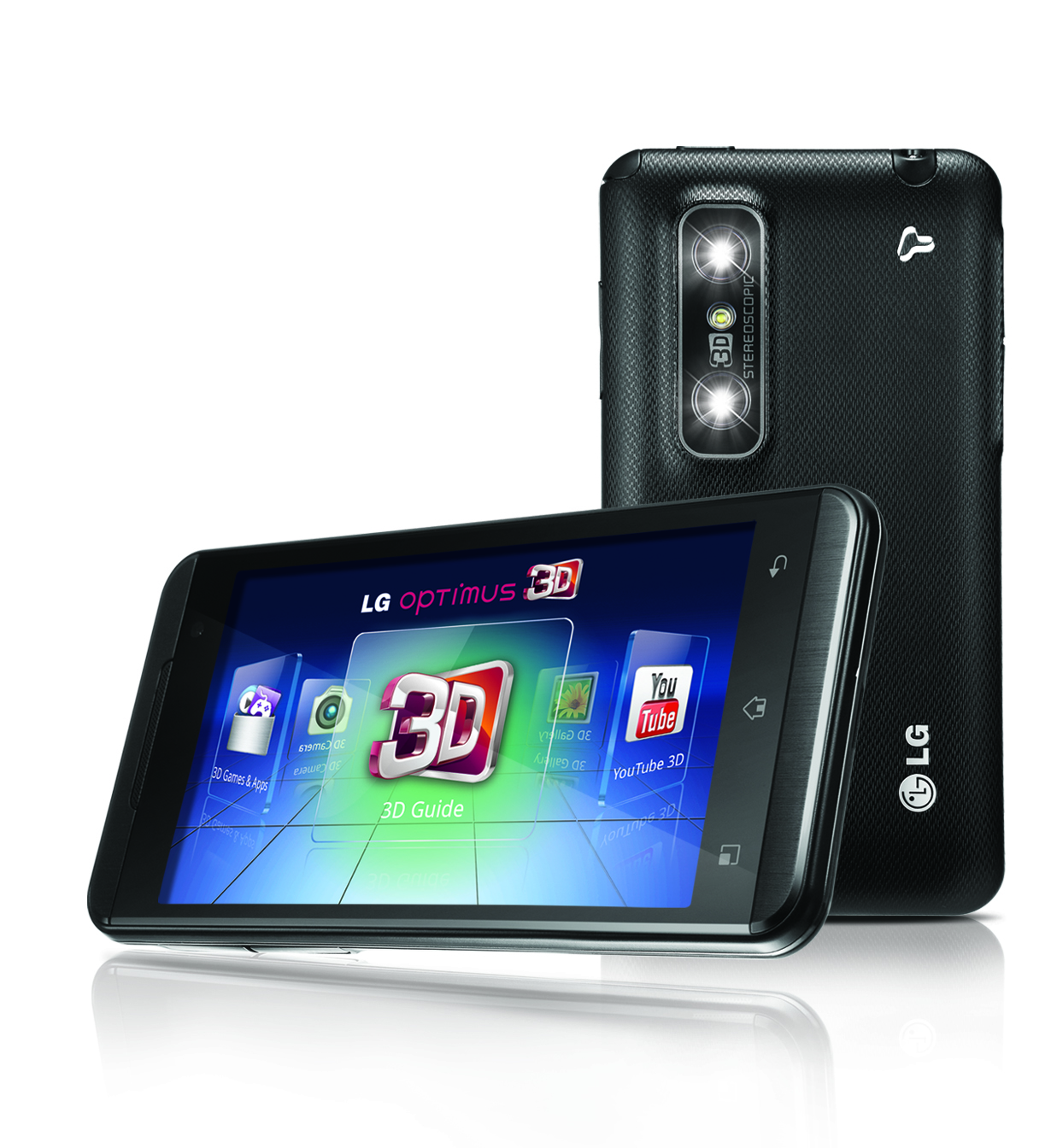 LG 옵티머스 3D 제품사진 모음